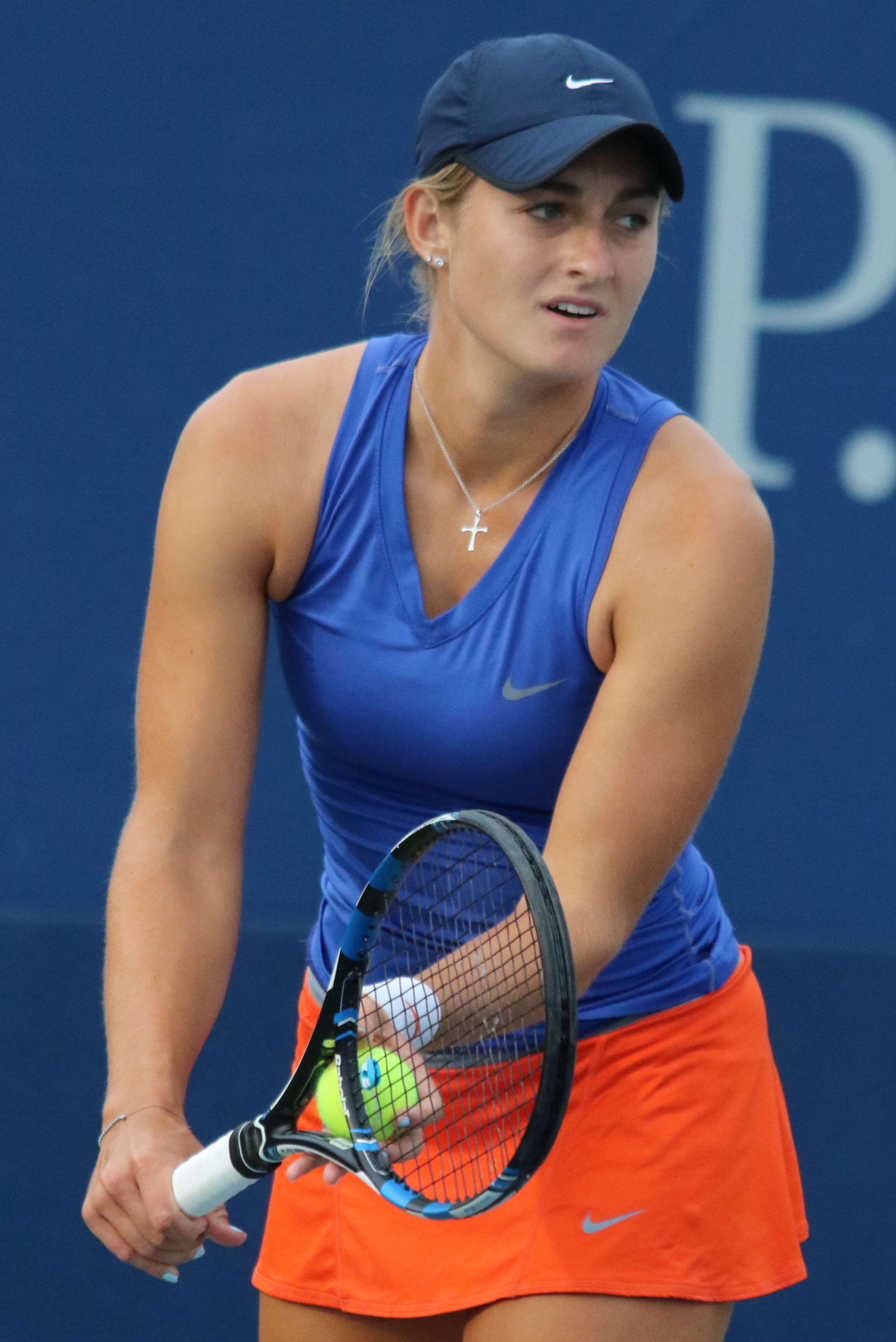 Keegan US16 (18)